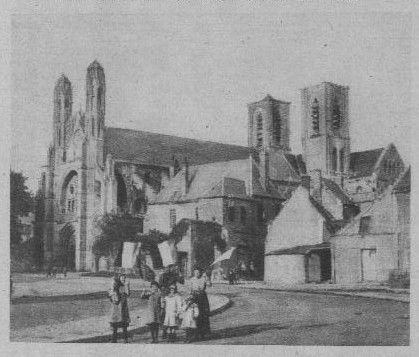 Le Pays De France N°_210_page 12_montrant Laon_lors de sa libération en 1918, vue de l'église St-Martin.